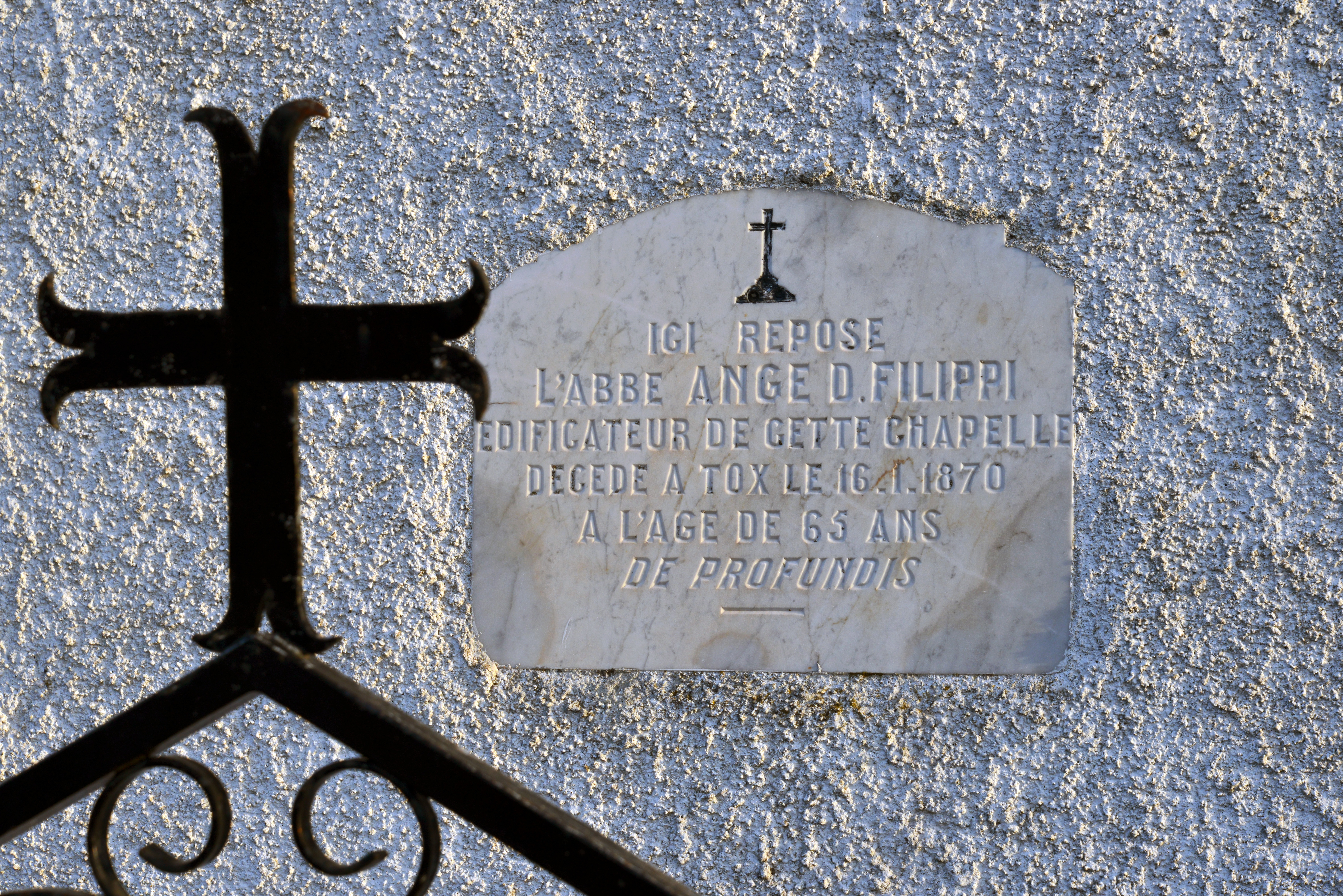 Tox, Plaine Orientale (Corse) - Plaque de l'abbé Ange D. Filippi, édificateur de la chapelle Notre-Dame delle Grazie